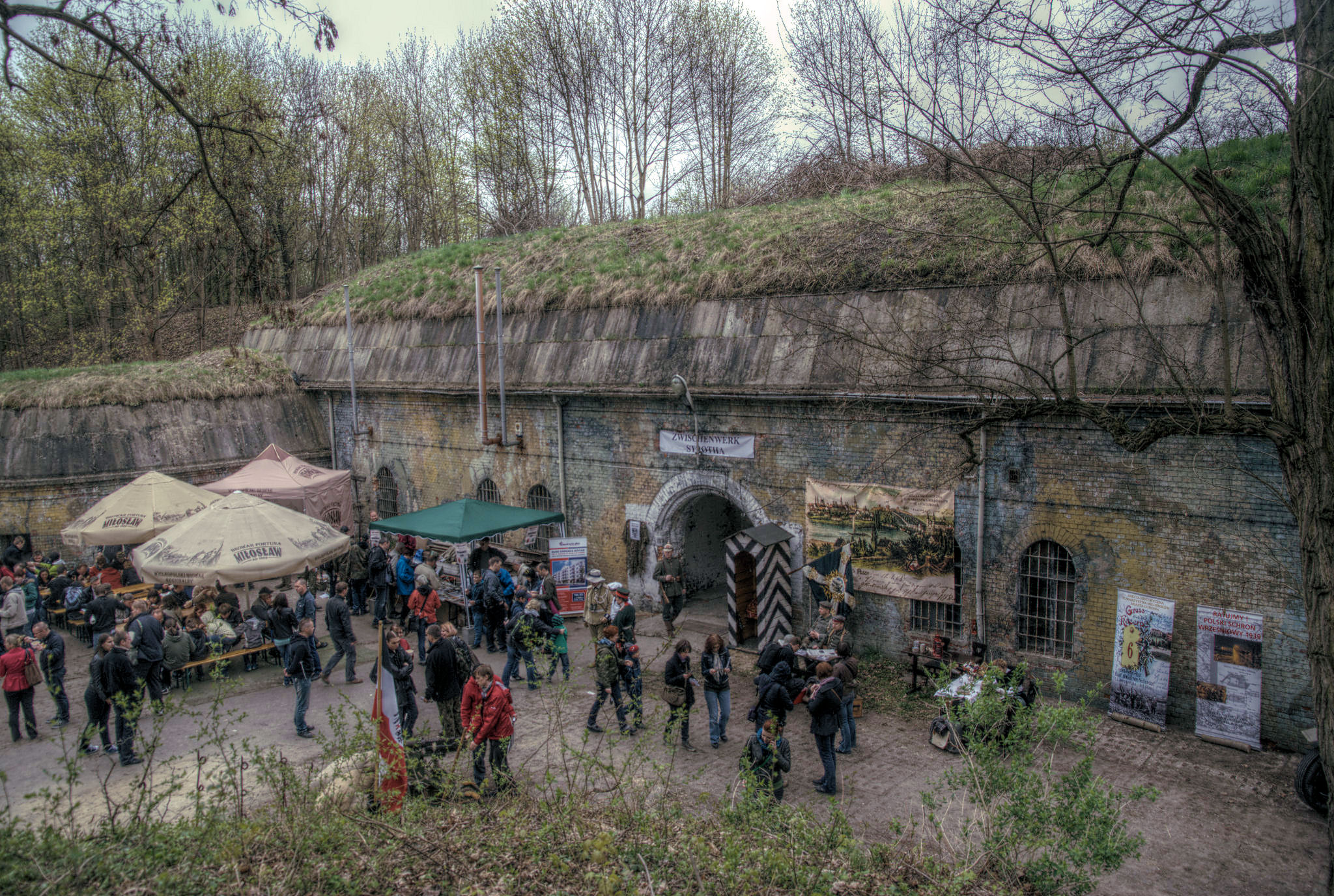 Fort VIIa, Poznań, Polska. Weekend forteczny, kwiecień 2013